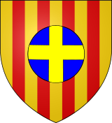 Escut de l'Escola de la Targa, Tolon